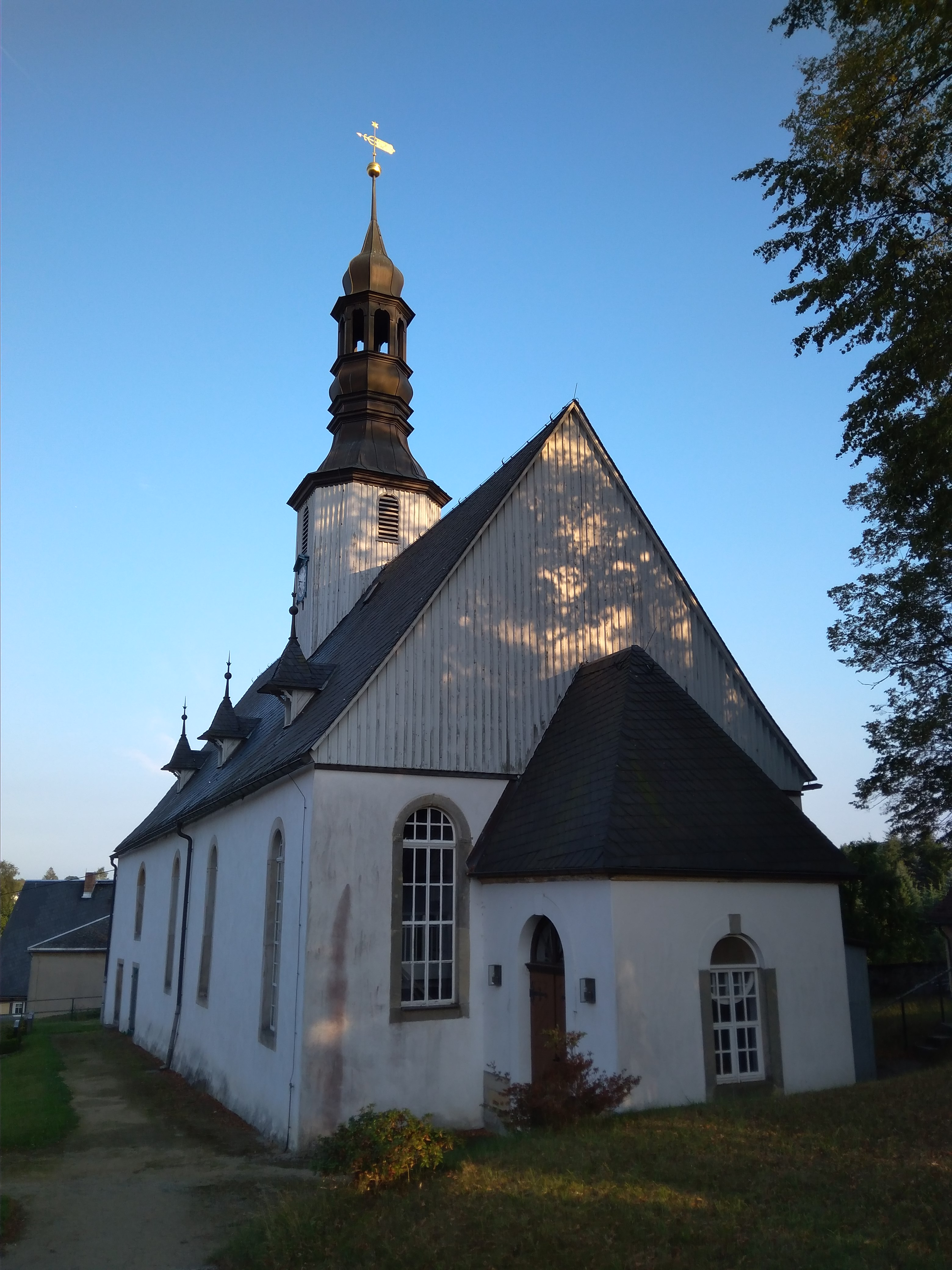 Vesnický kostel v Ulbersdorfu, město Hohnstein